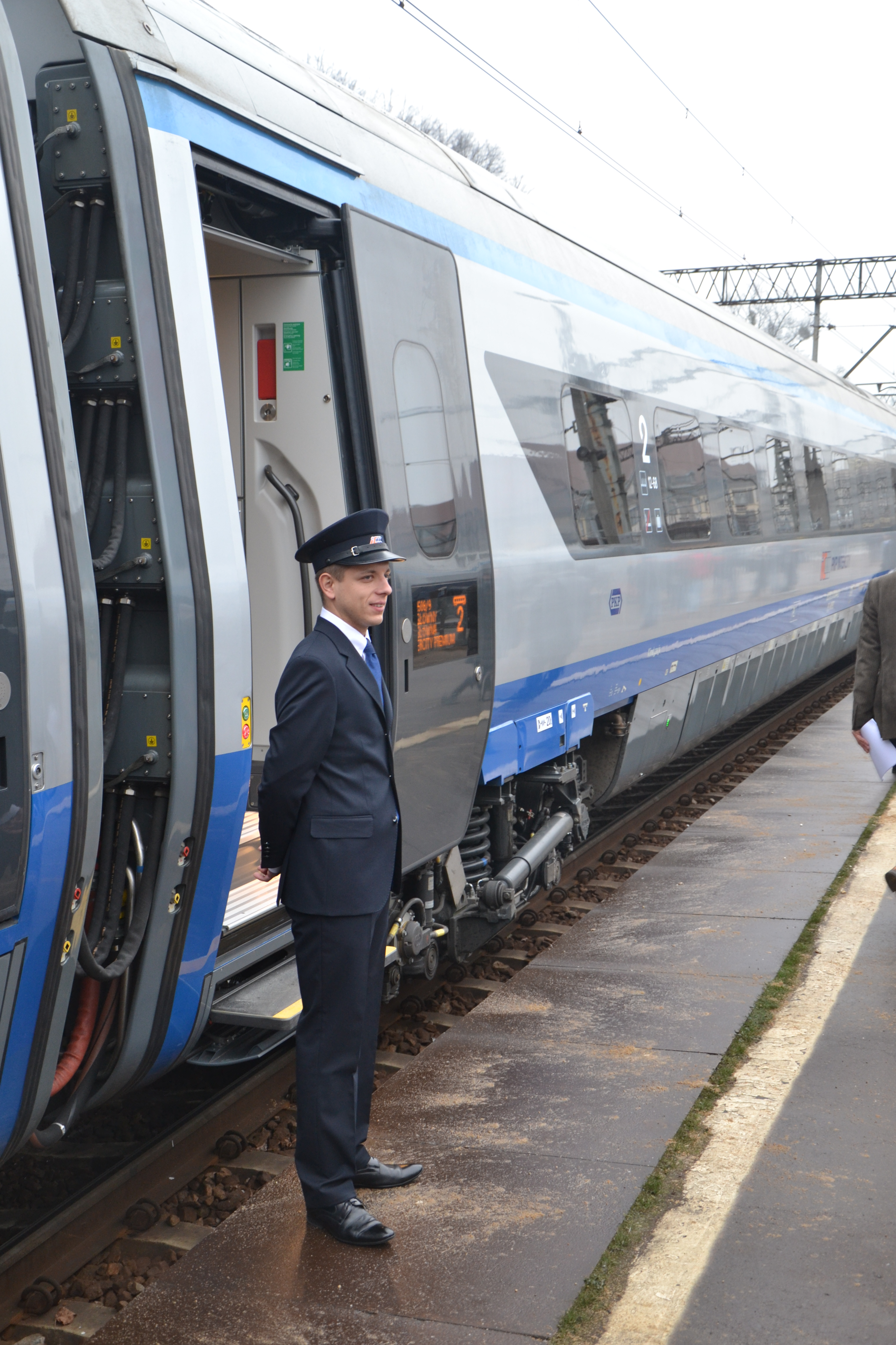 Obsługa konduktorska składów EIP